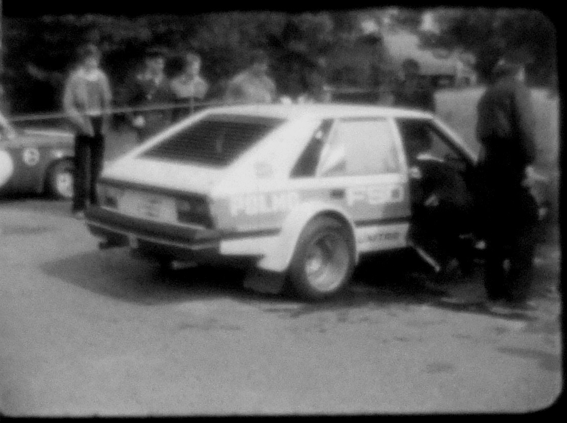 Kadr z amatorskiego filmu 8 mm. „Stratopolonez” - FSO Polonez 2500 Racing w parku maszyn podczas II Targowego Wyścigu Samochodowego na torze Poznań 17. 06. 1979 r. Kierowca - Maciej Stawowiak